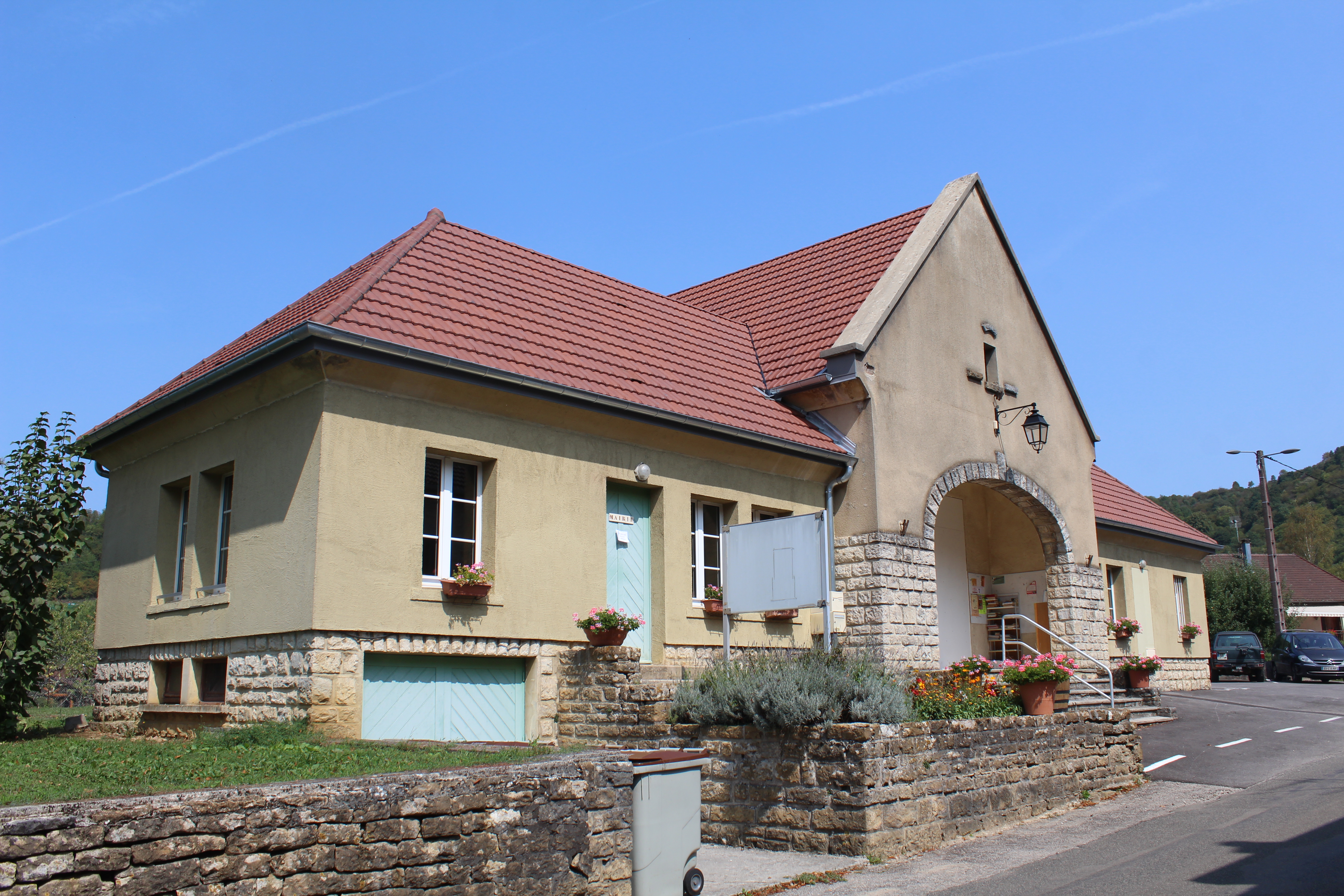 Mairie de Mesnay.